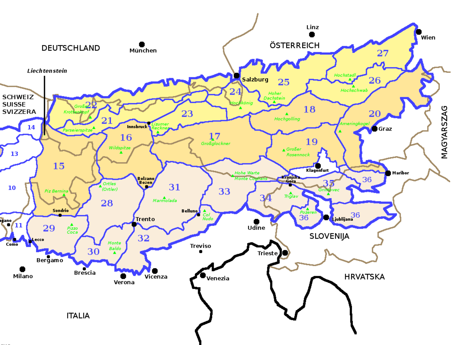 Carta schematica delle Alpi Orientali secondo la SOIUSA, divise per colore in Alpi Nord-orientali, Alpi Centro-orientali ed Alpi Sud-orientali